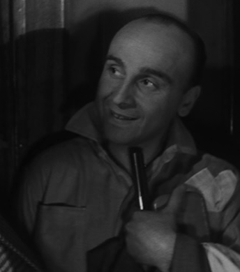 Scena dal film Vita da cani (1950)